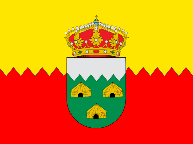 Bandera de Cabanillas de la Sierra